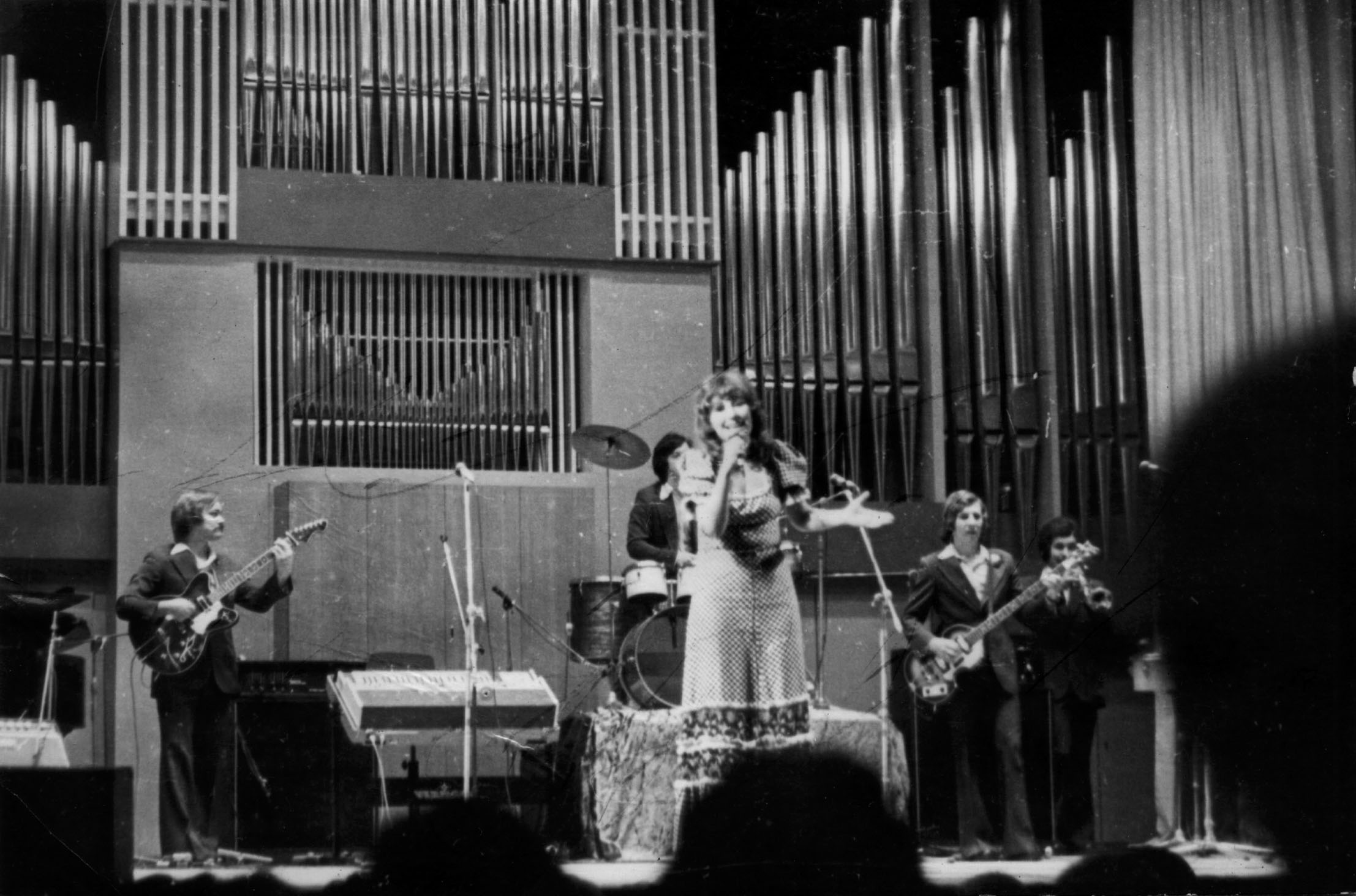 Алла Пугачева и группа "Веселые ребята" ~ 1975 г., г. Ярославль, филармония